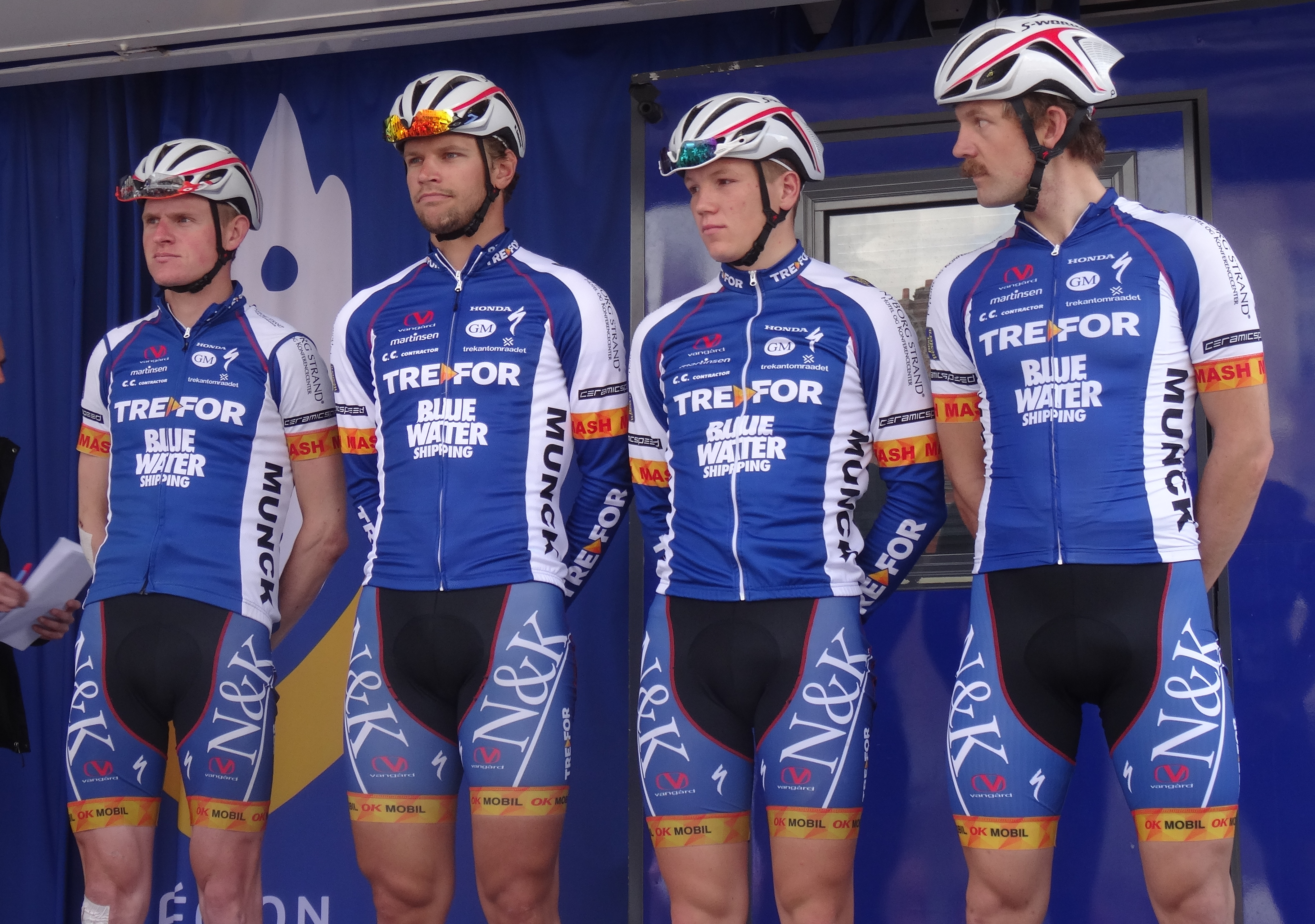 Reportage photographique réalisé le dimanche 25 mai 2014 à l'occasion du départ et de l'arrivée de la troisième étape du Paris-Arras Tour 2014 à Arras, Pas-de-Calais, Nord-Pas-de-Calais, France. Depicted team: Trefor-Blue Water